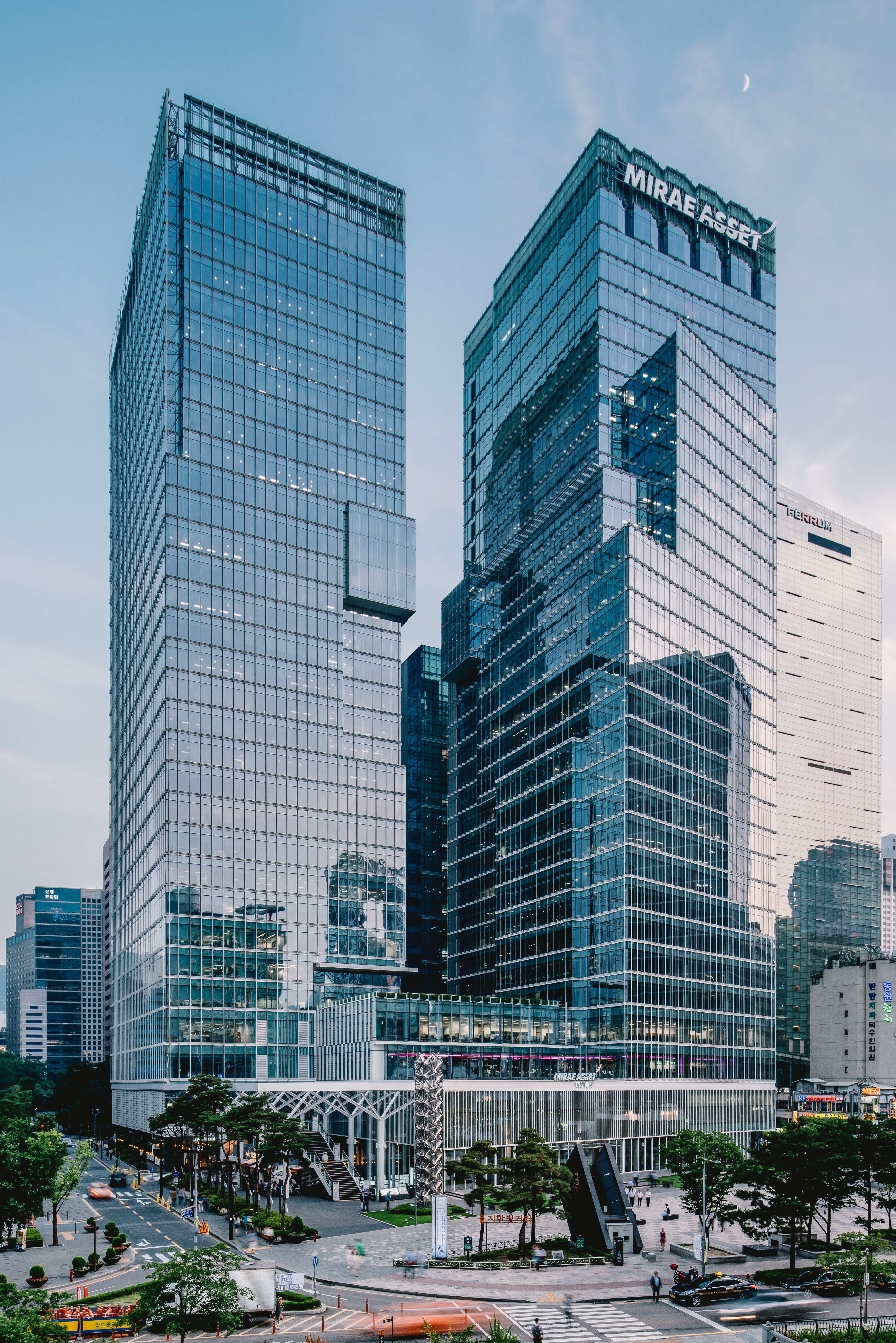 미래에셋센터원빌딩 전경